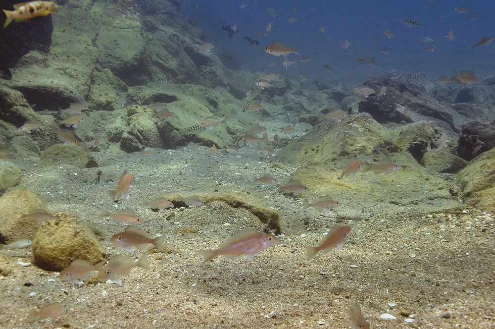 Biotope intermédiaire sur l'île de Nkondwe (Tanzanie-lac Tanganyika)